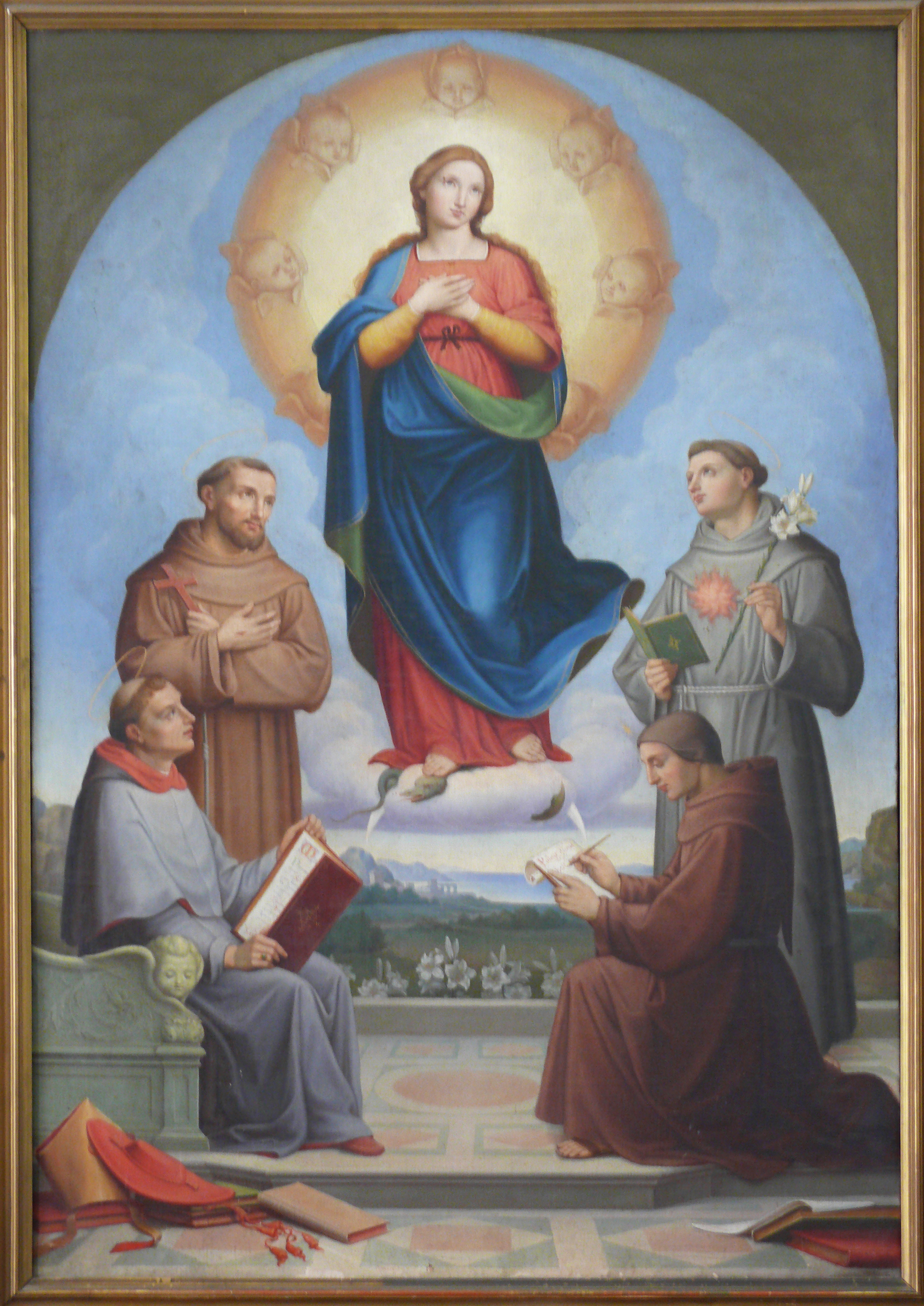 Immacolata con i santi Bonaventura, Francesco, Antonio e b. G. Duns Scoto - Roma - Pontifica Università Antonianum.